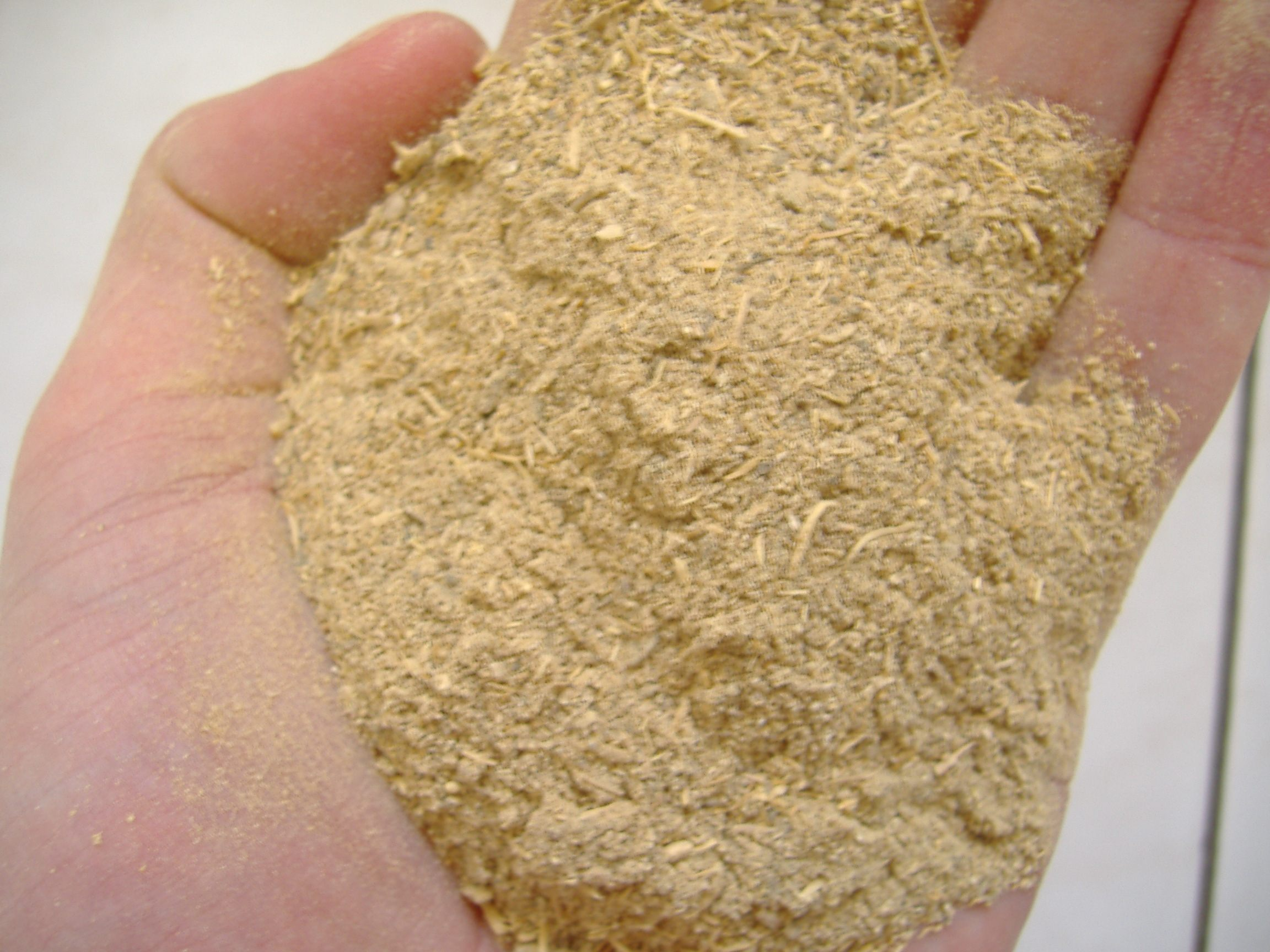 Kava réduit en poudre. Prêt à être mélangé avec l'eau pour consommation.